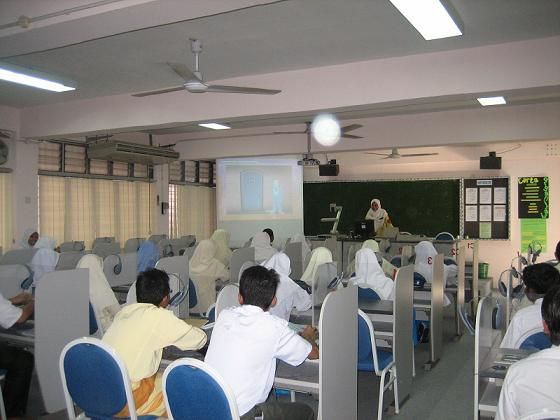 KLIA Language Lab